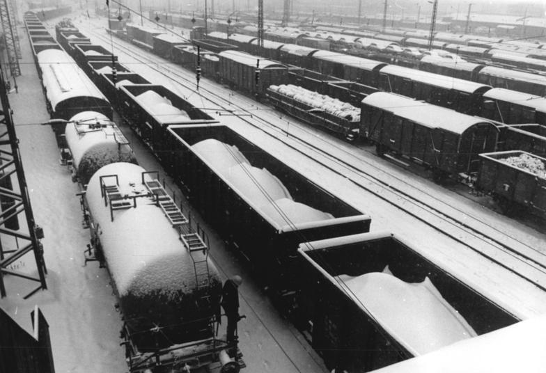 Dresden, Rangierbahnhof, Winter ADN-ZB Häßler 22.11.85-ad-Dresden: Rangierbahnhof - Rangierbetrieb auf dem Güterbahnhof Dresden-Friedrichstadt,an dessen Ablaufberg auch die letzte Weiche auf elektrische Beheizung umgestellt wurde. Bisher war ein großer Teil der Weichen mit Propangas beheizt worden.